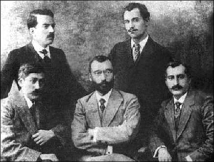 نشسته از راست: باقرخان رامشگر؛ سیدحسین طاهرزاده؛ درویش‌خان ایستاده از راست: عبدالله دوامی، ابوالحسن اقبال آذر